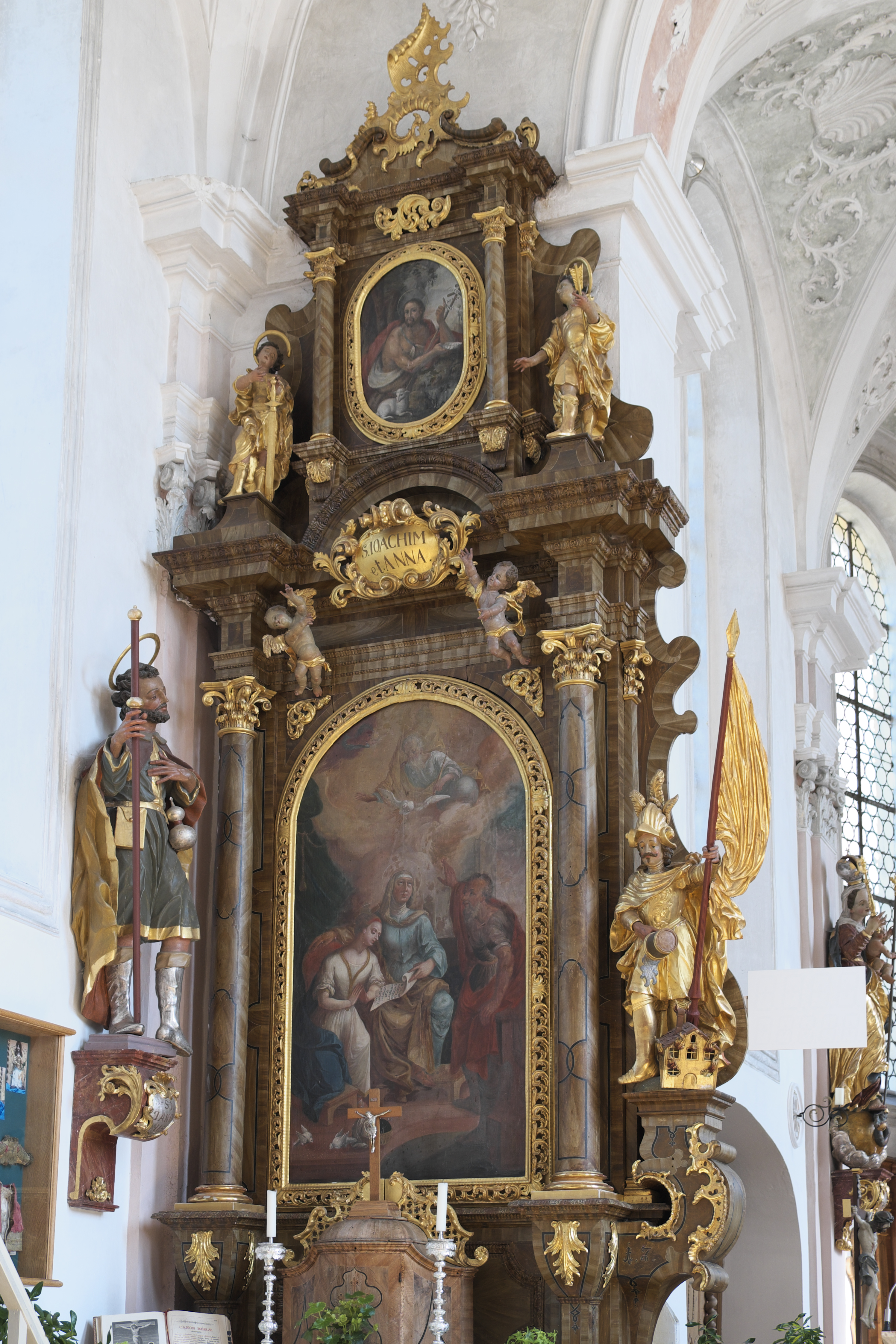 Katholische Pfarrkirche Mariä Himmelfahrt in Epfenhausen (Penzing) im Landkreis Landsberg am Lech (Bayern/Deutschland), linker Seitenaltar